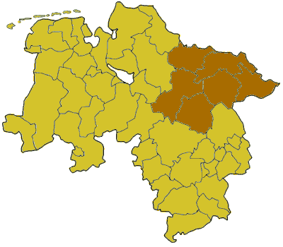 Map of Regierungsbezirk Lüneburg in Lower Saxony (1 January 1978)